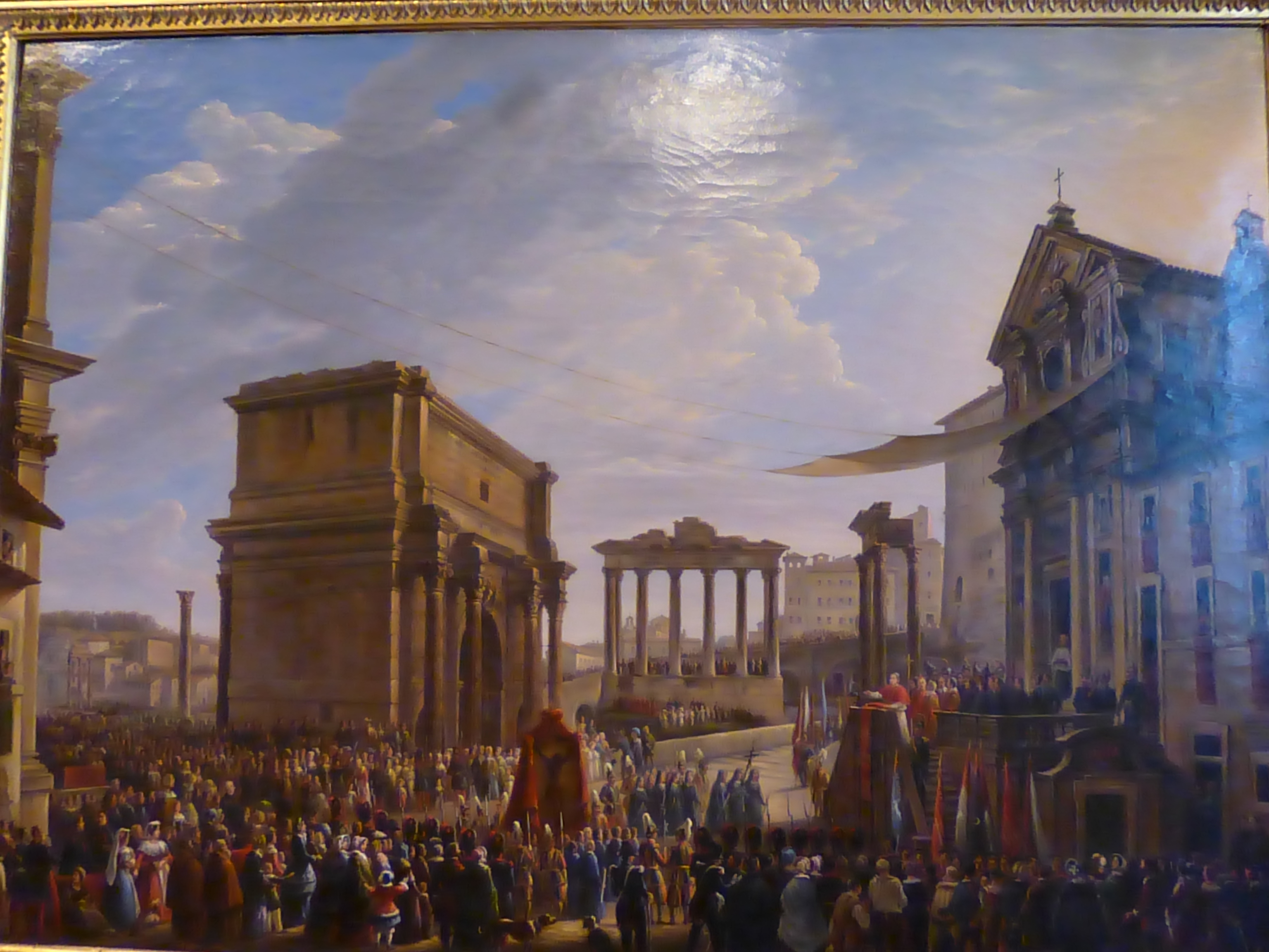 Museo di Roma a Palazzo Braschi. Predica di Pio IX in occasione dello spostamento del crocifisso di Campo Vaccino nella cappella di S. Giuseppe dei Falegnami (Michelangelo Pacetti, 1855)